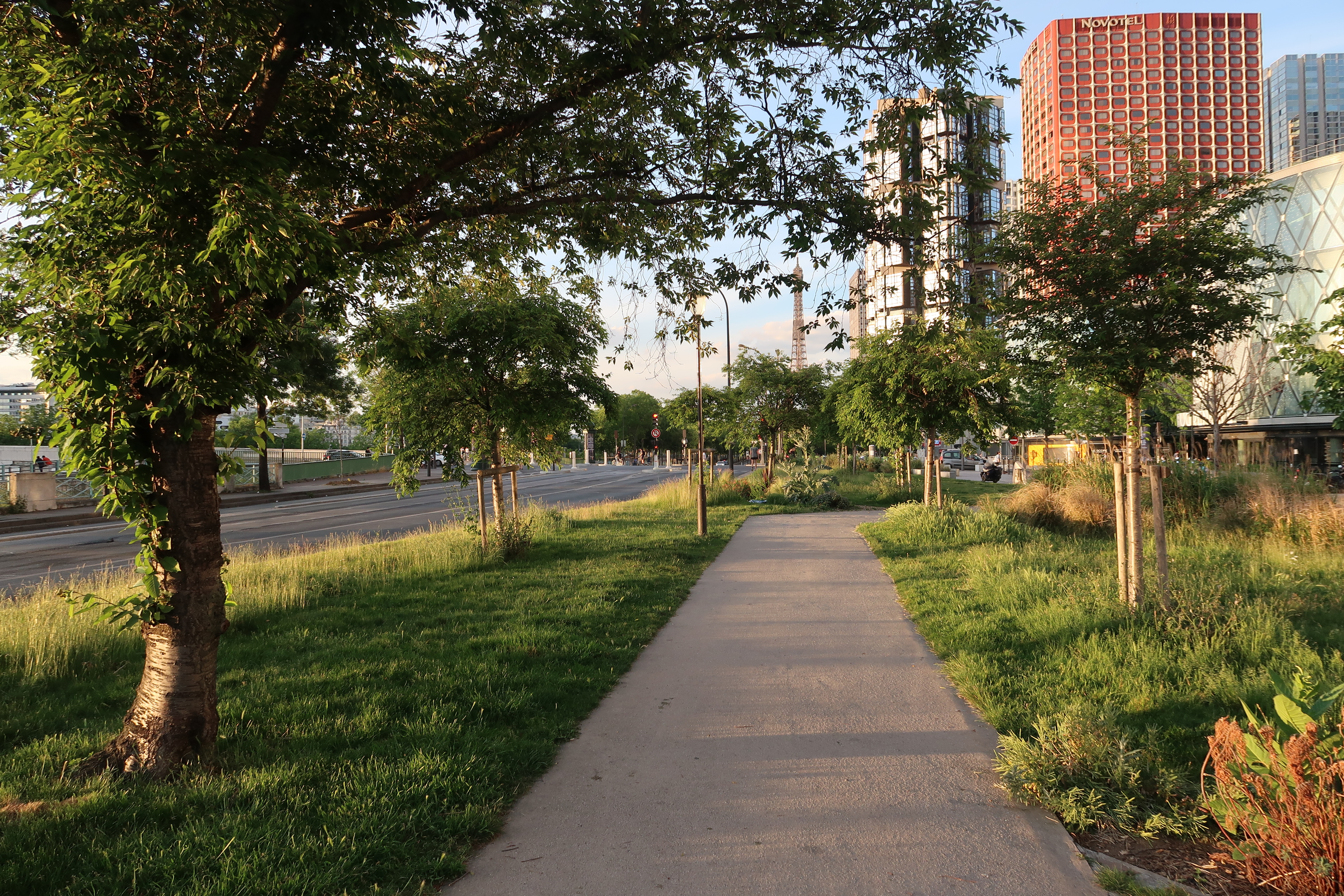 Jardin de la place Fernand-Forest (Paris, 15e).